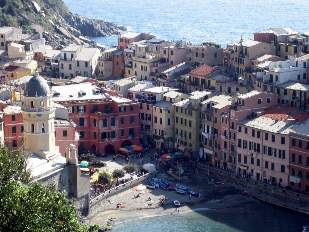 Vernazza, Liguria, ItalyCinque Terre